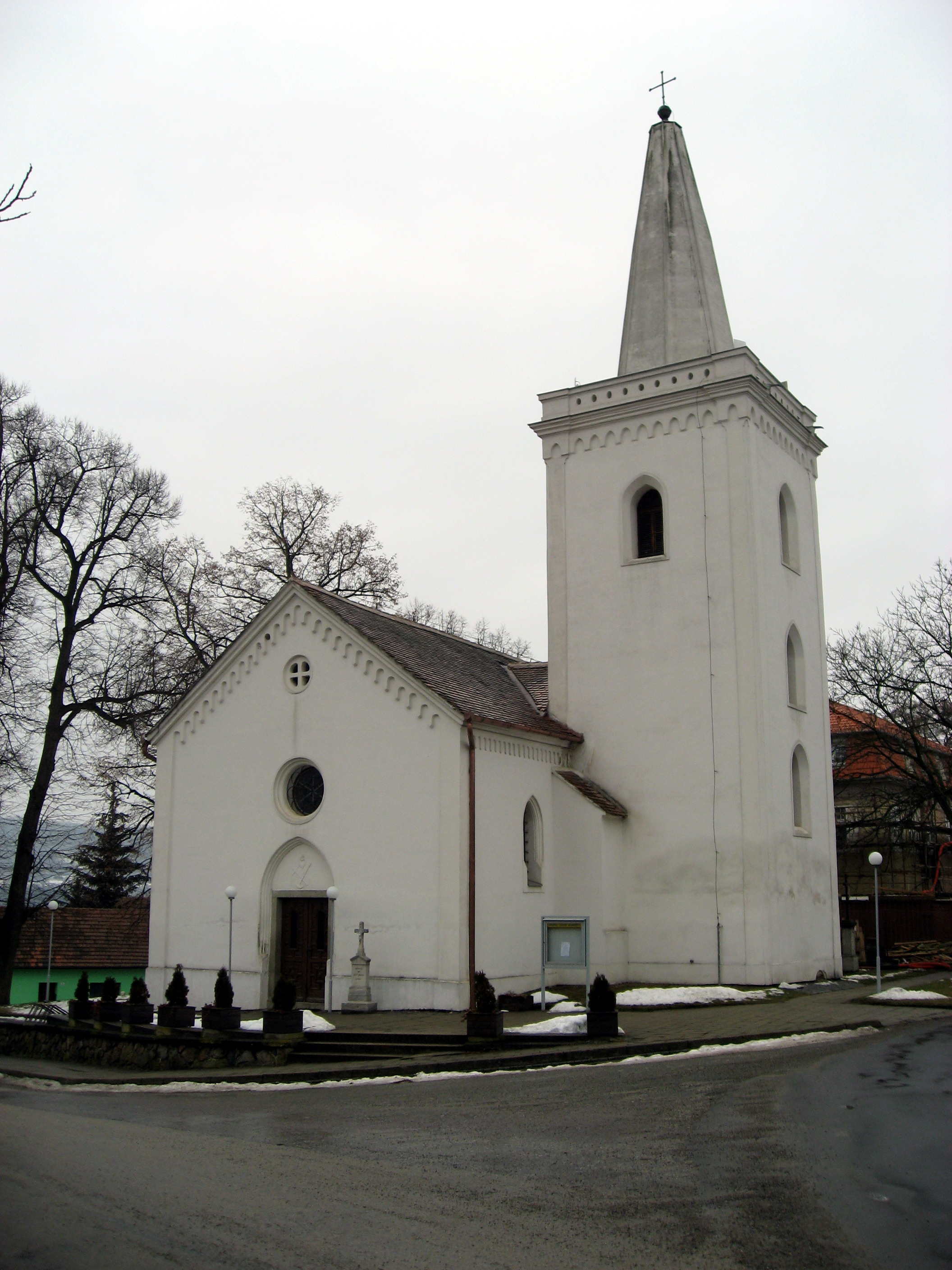 Moravské Knínice, kostel sv. Markéty